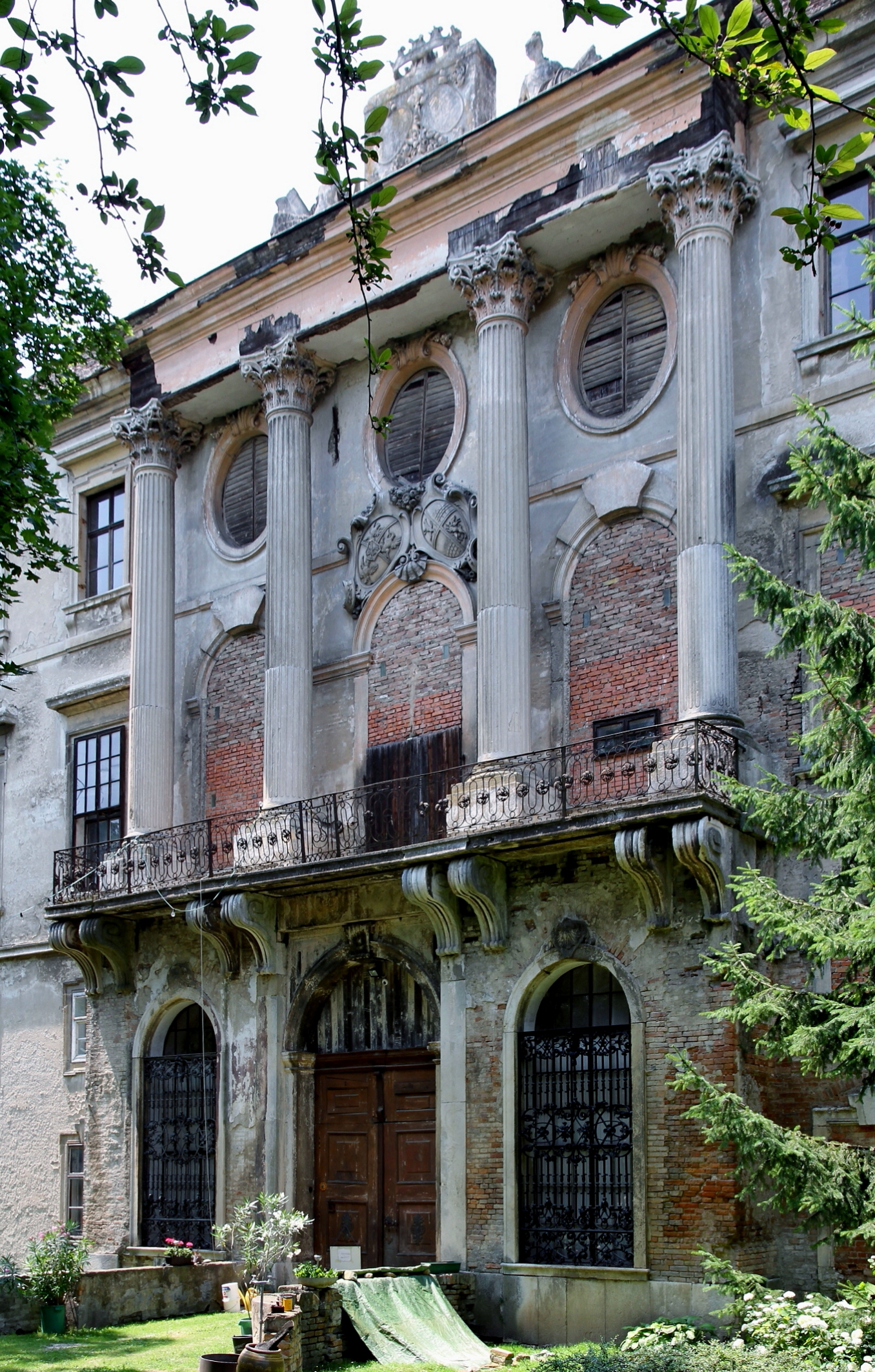 Südfassade des Schlosses Thürnthal in Thürnthal, ein Ortsteil der niederösterreichischen Gemeinde Fels am Wagram.